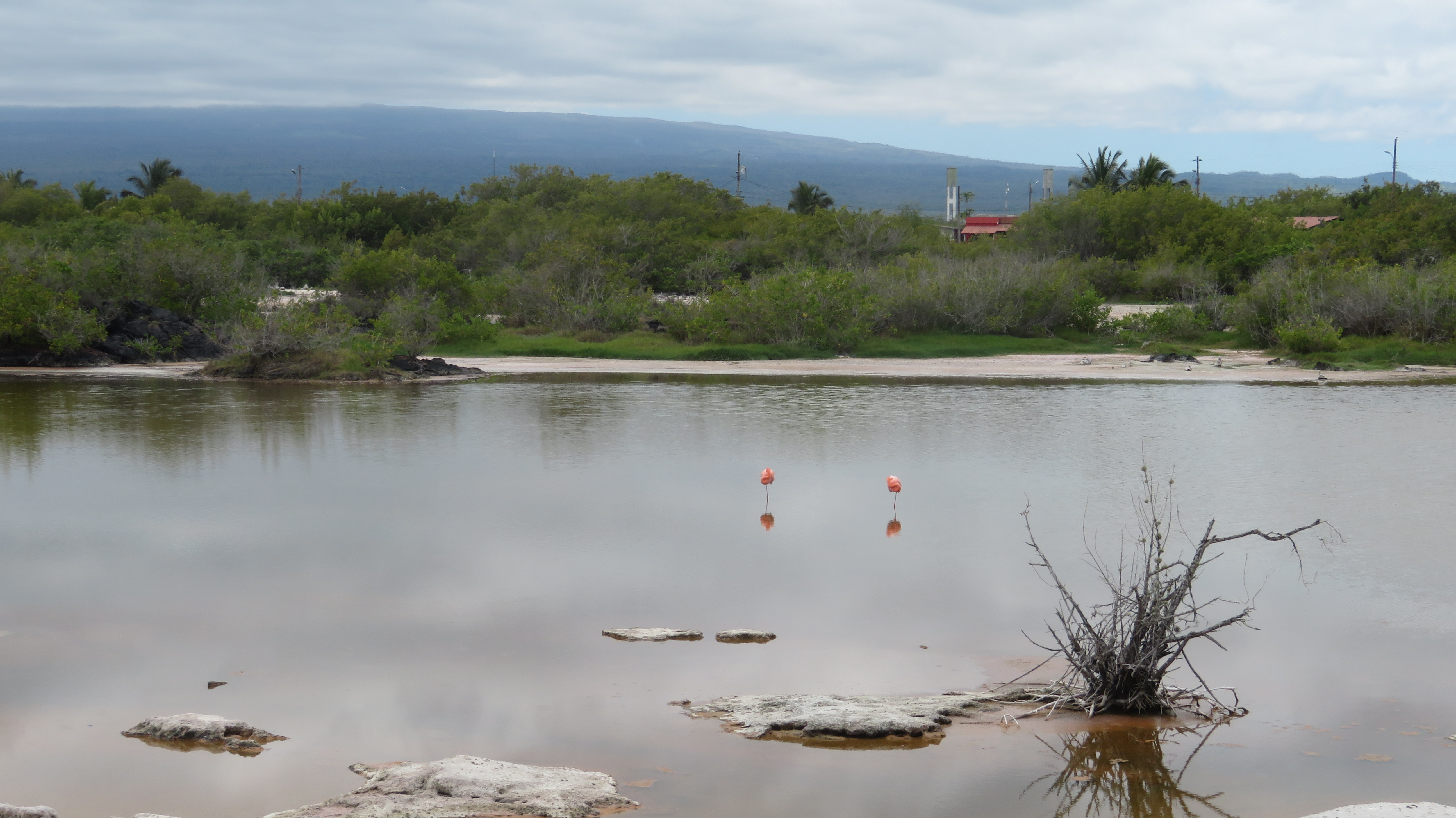 Poza de los Flamingos, Puerto Villamil, Isla Isabela, Islas Galápagos, Ecuador